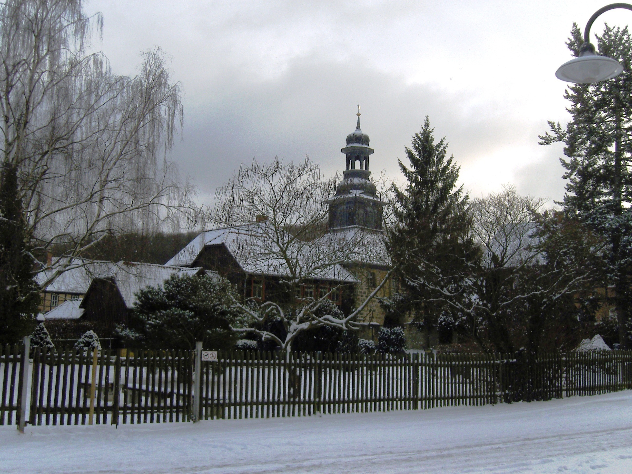 Kloster Michaelstein; Außenansicht